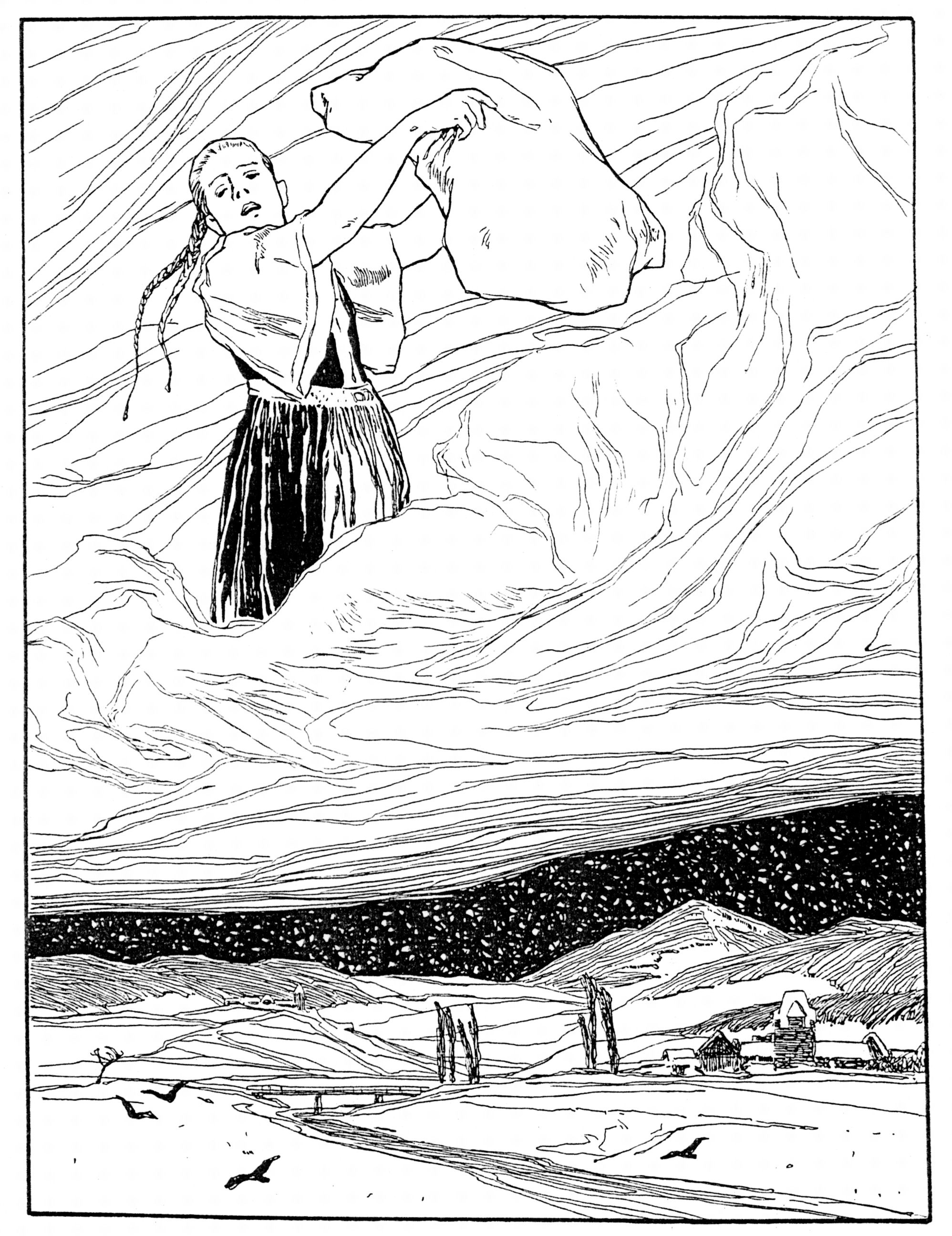 Frau Holle, Landschaftsvorlage: das Lahntal